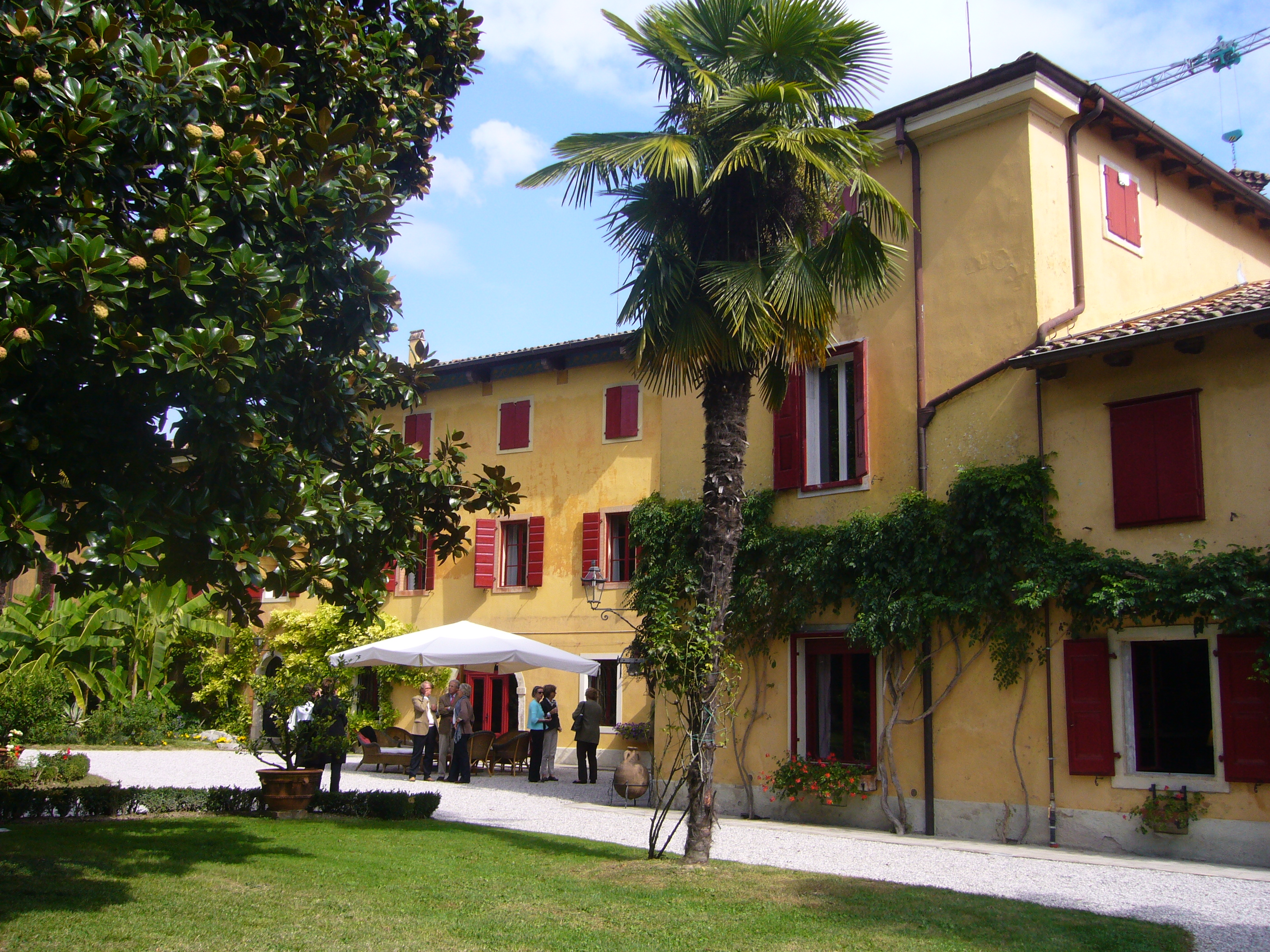 Villa Iachia in Ruda, Italië